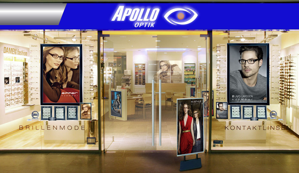 Filialansicht Apollo-Optik